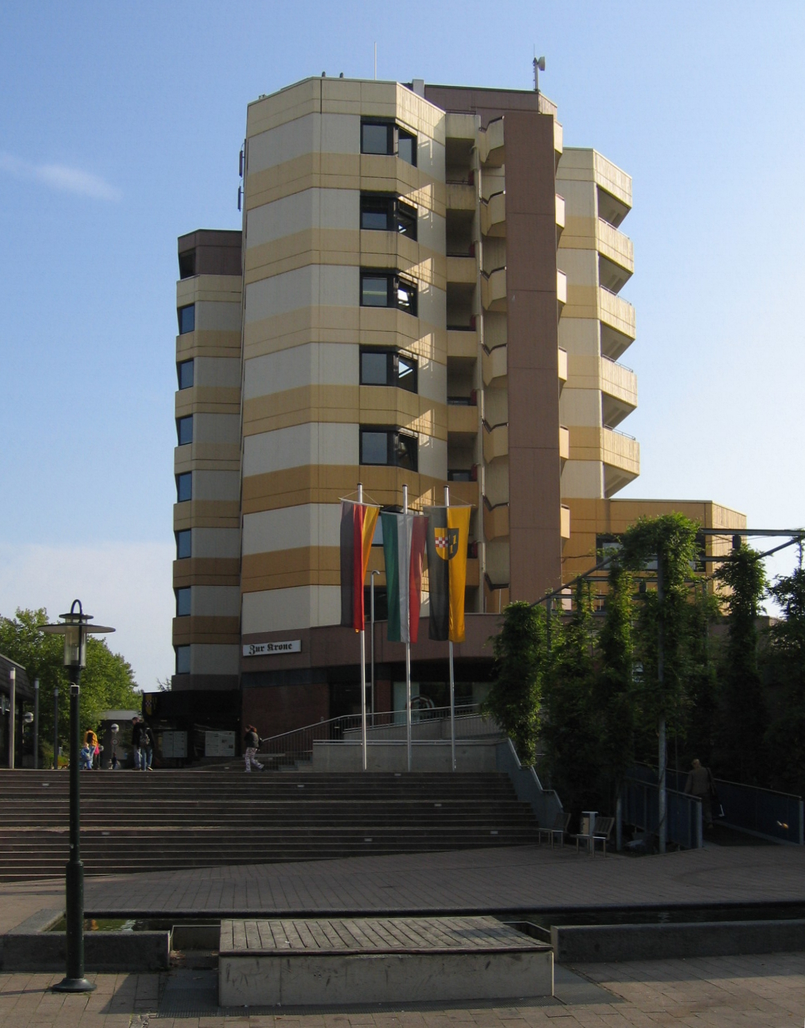 Rathausgebäude in Hemer.